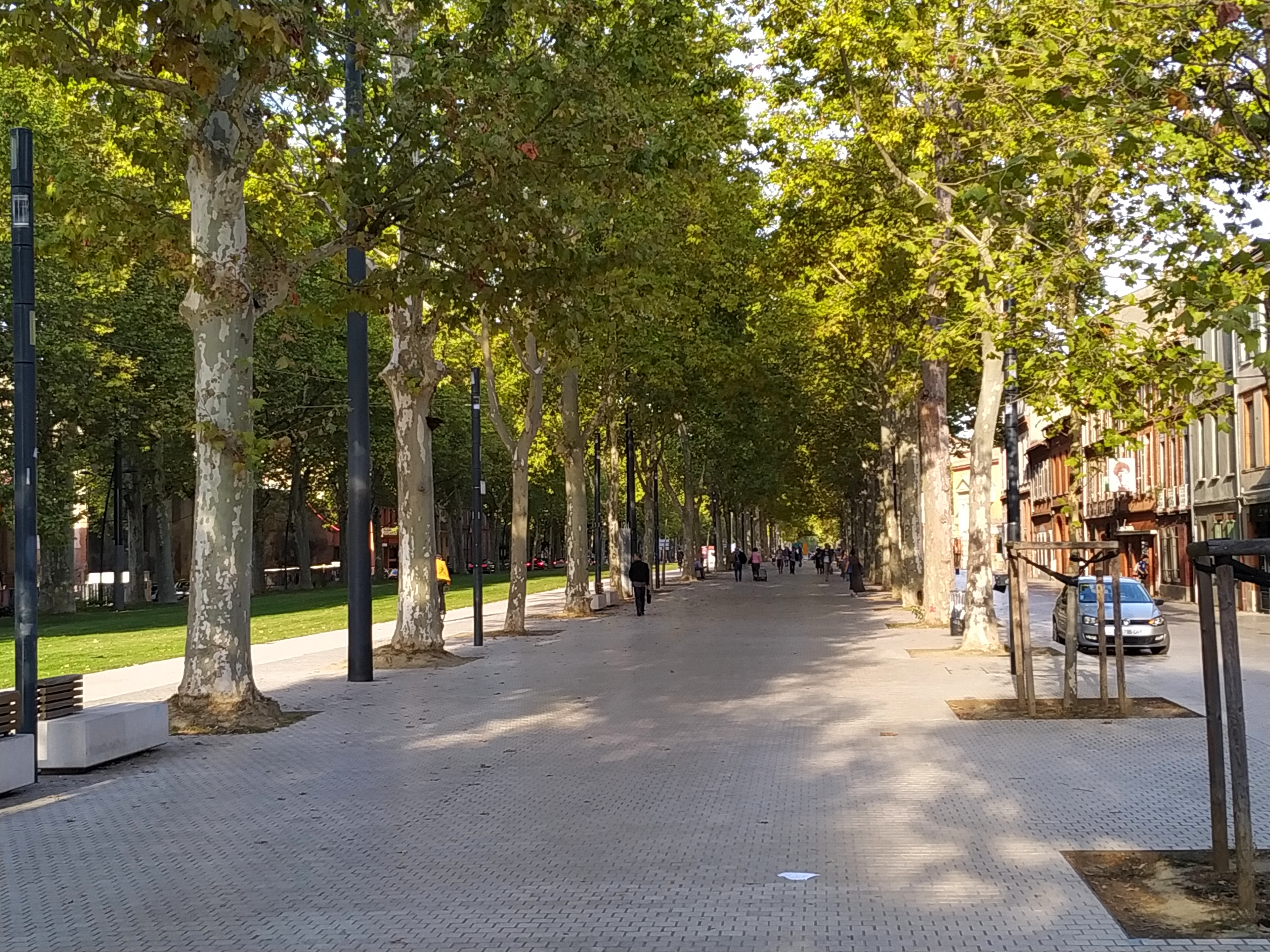 Les allées Jules Guesde à Toulouse.